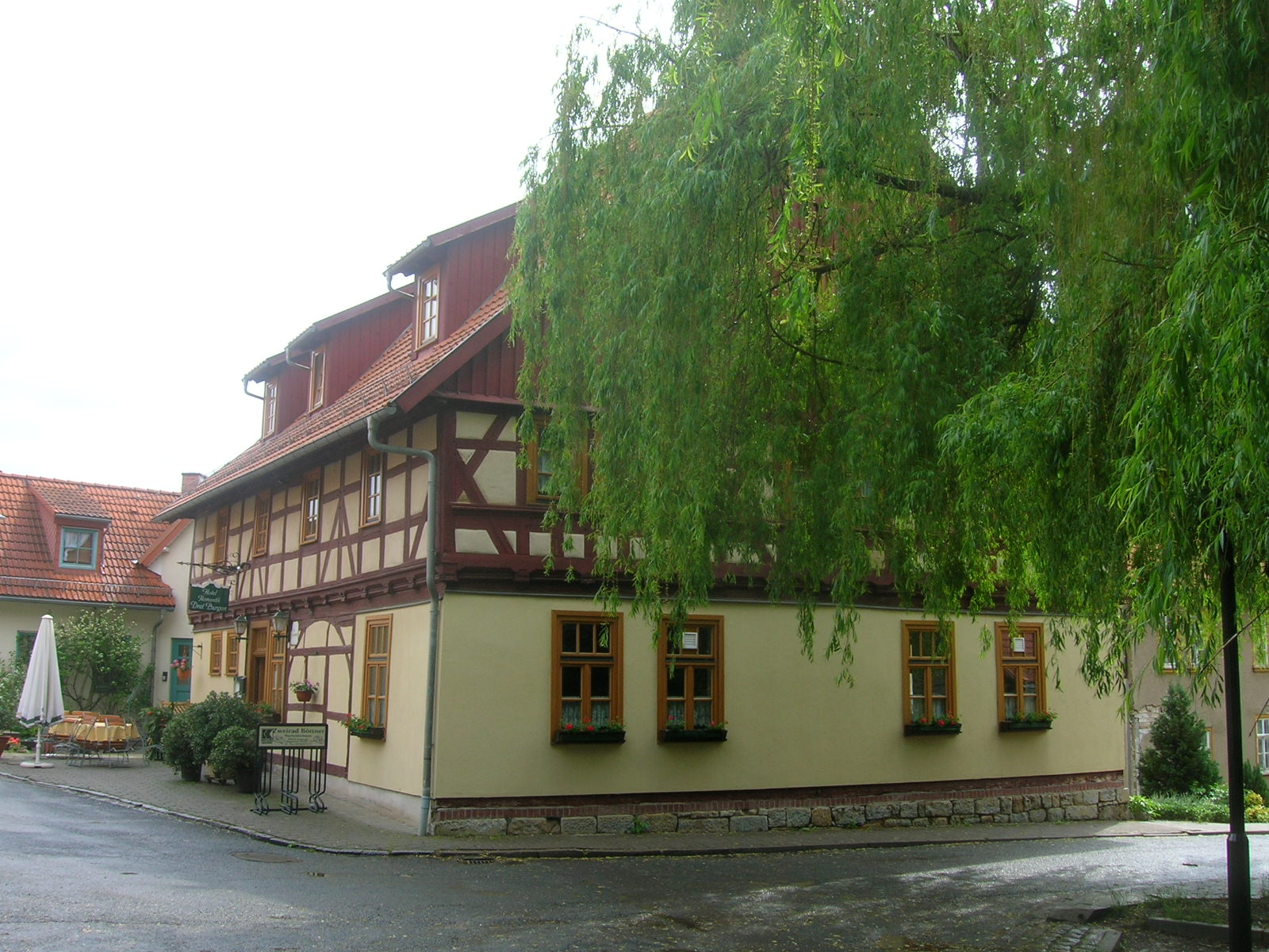 Holzhausen im Ilm-Kreis, ehemaliger Dorfgasthof, heute Romantik-Hotel "Drei Gleichen"